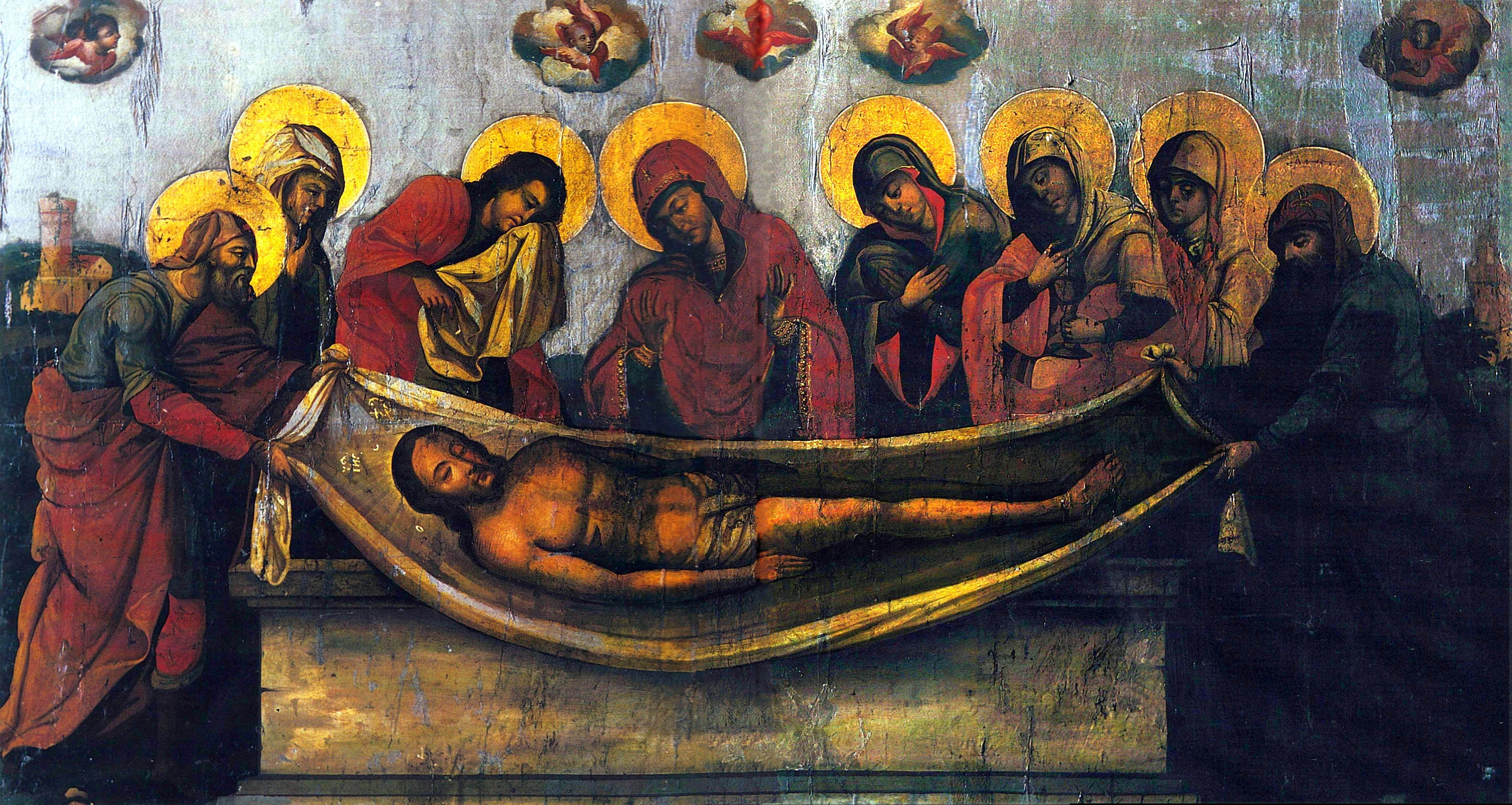 Nicolae Grigorescu - Epitaful de Mănăstirea Zamfira,versiune restaurata de Utilizator:Miehs